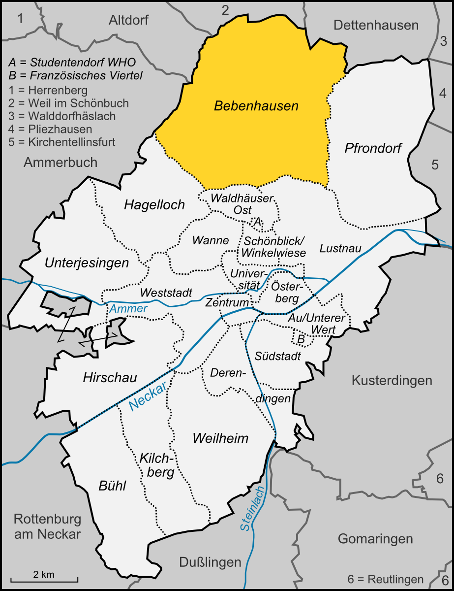 Karte des Stadtteils Bebenhausen der Stadt Tübingen